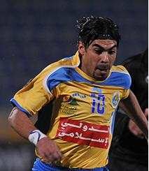 Clemerson de Araújo Soares